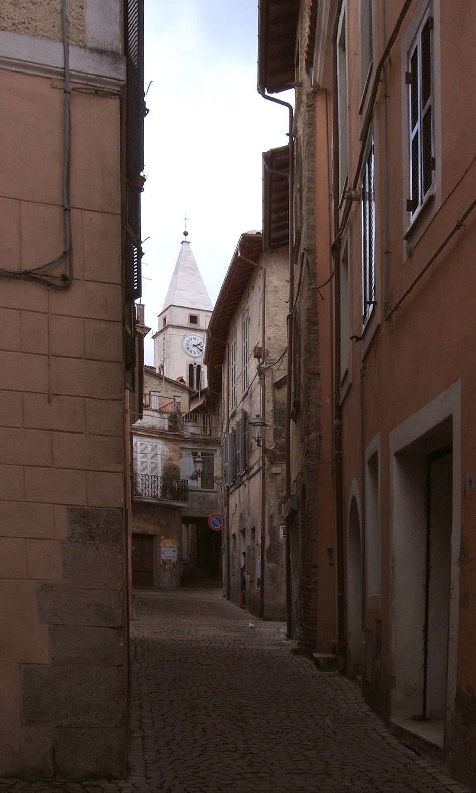 Ponzano, Roma